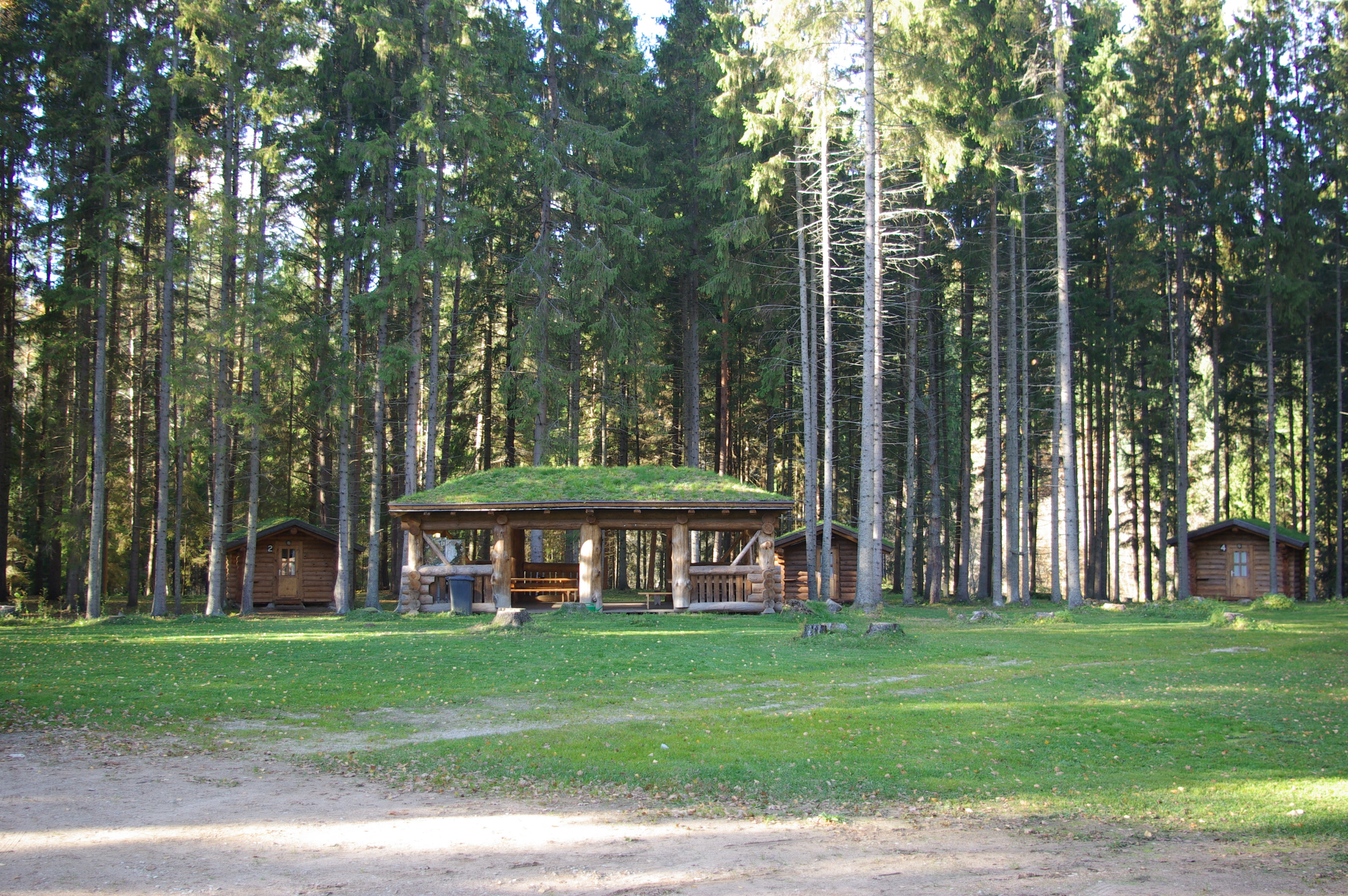 Piusa Ürgoru Puhkekompleksi kämpingud